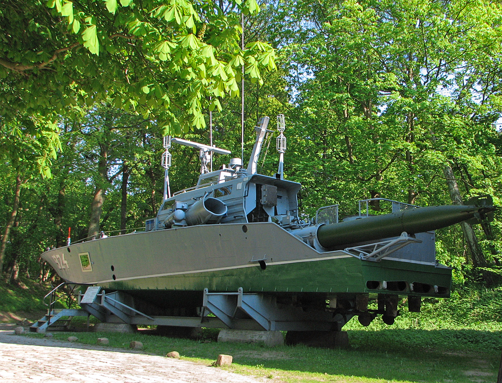 Dieses Bild zeigt ein Kleines Torpedoschnellboot Projekt 131 Typ Libelle der Volksmarine im Marinemuseum Dänholm. Typ: Schnellboot Projekt 131 / 131.400 Libelle Typ KT Bauwerft: Rechlin Werft / Endausrüstung Peenewerft Wolgast Stückzahl: 34 Verdrängung: 28-36 t Länge ü.A.: 18,96 m Breite ü. A.: 4,42 m Tiefgang: 1 m Antrieb: drei Dieselmotoren M50 F3/4 und F6/7 mit 2647 kW (3x 1200 PS) auf 3 Schrauben Geschwindigkeit: 48,5 kn Reichweite: 350 sm Bewaffnung: zwei Torpedorohre (Ø 533 mm) / eine Zwillingsflak 23 mm L/80 DL2V23 (nicht im Bild) / 2 Ausstoßrohre für Grundminen Typ UDM / Radar TSR 333 Besatzung: 5 Mann Im Einsatz bei der Volksmarine der DDR bis 1990. Other Versions